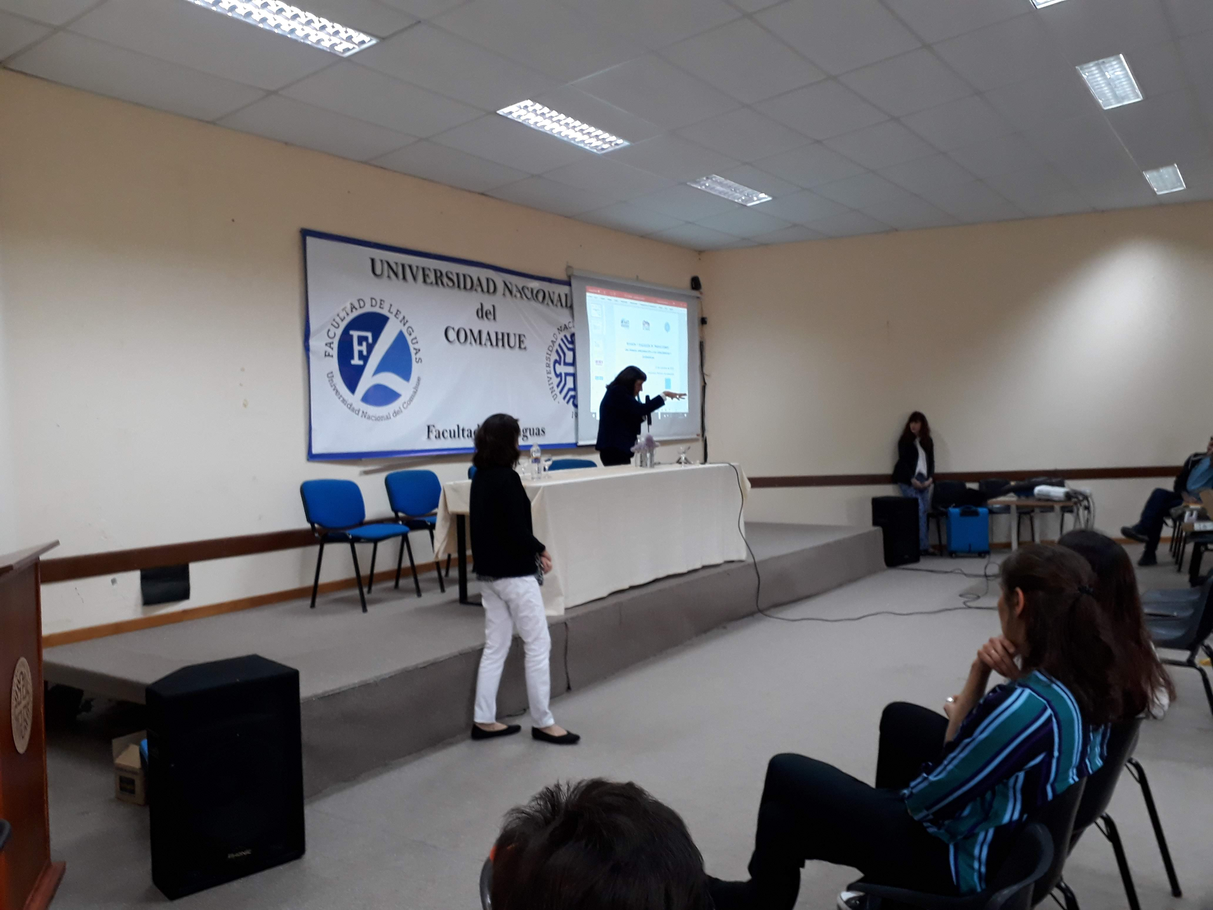 Jornada para traductores 2019. FadeL, UNCo